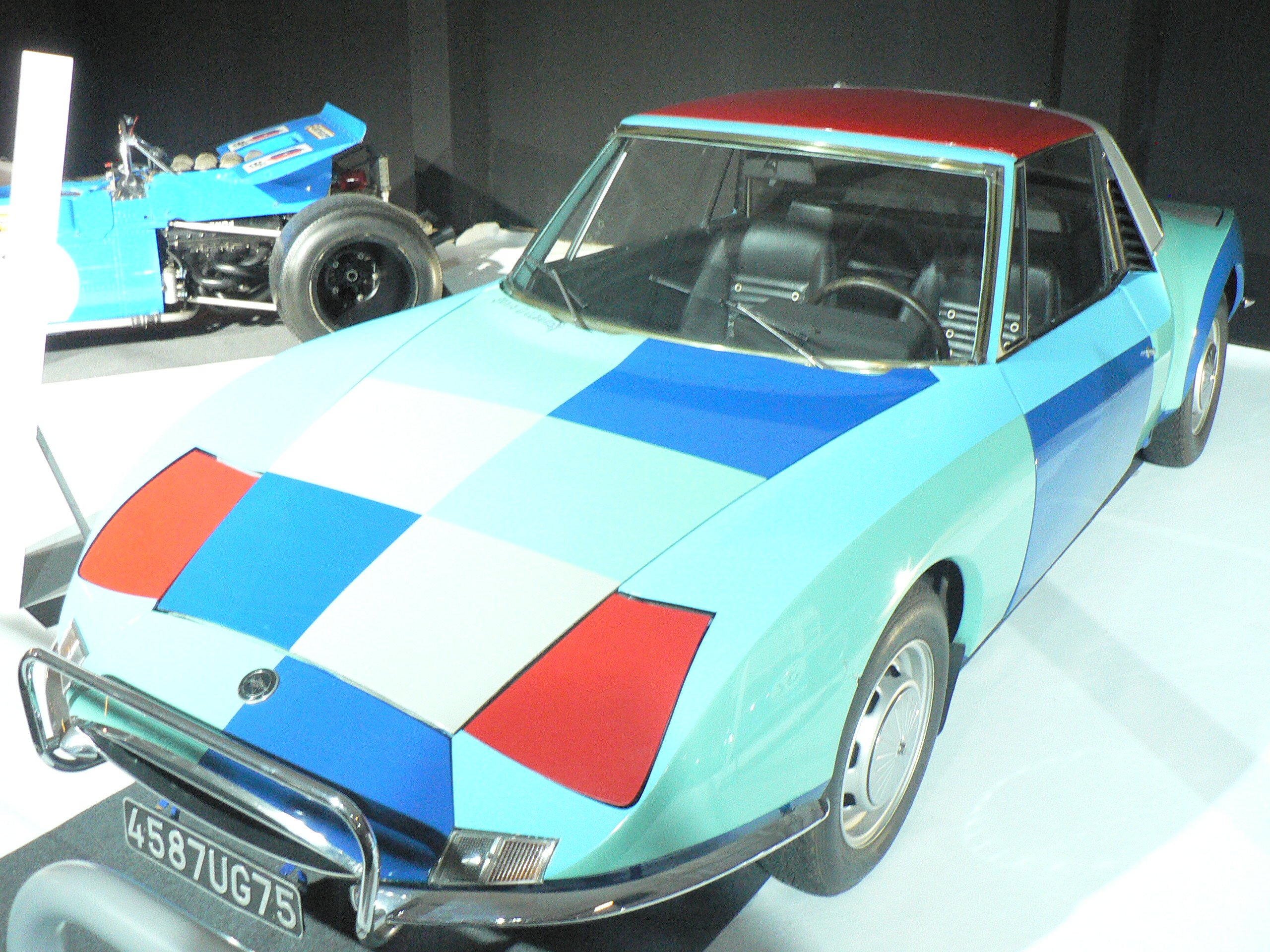 Mondial de l automobile de Paris (October 2006)